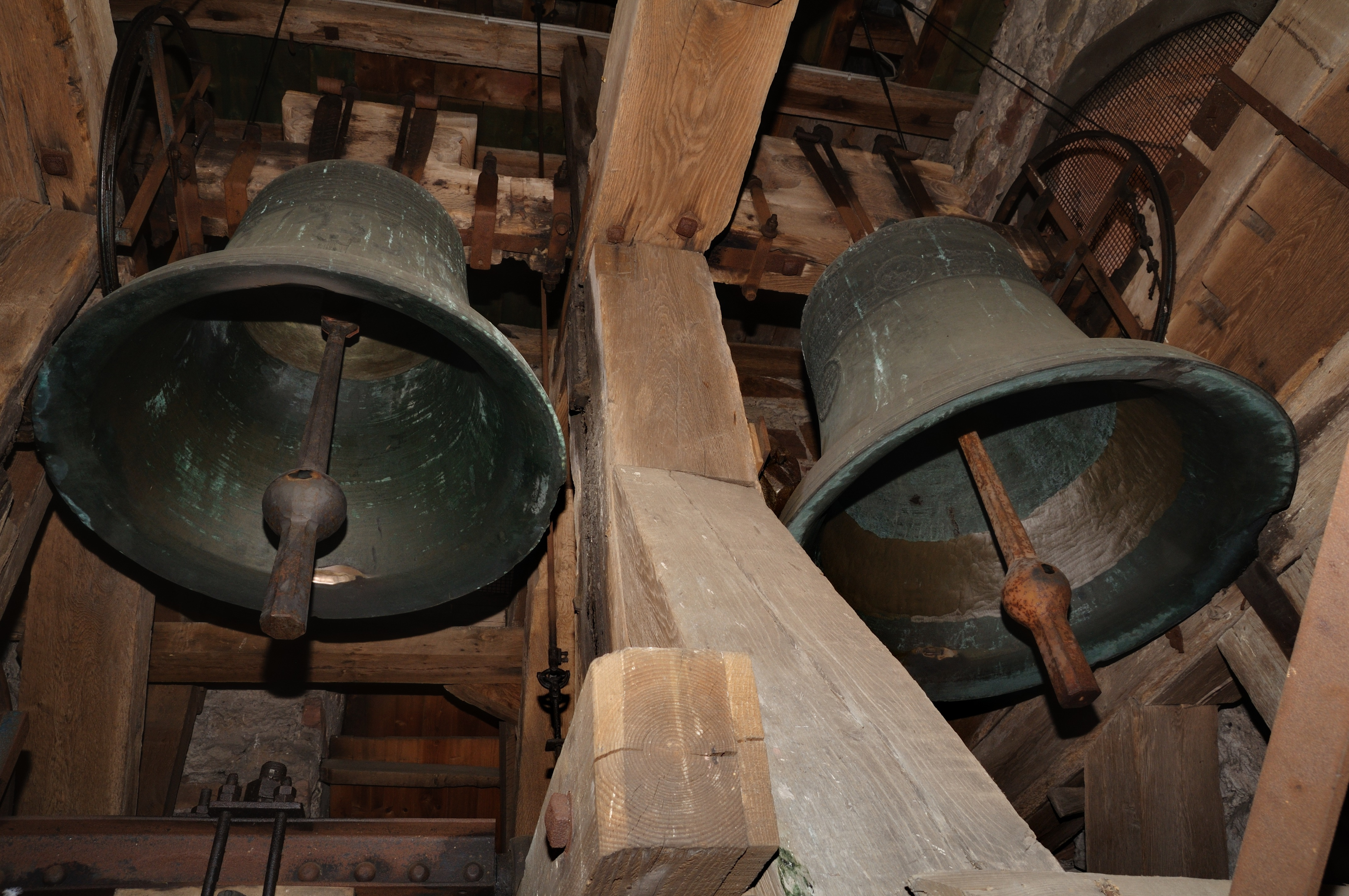 Lörrach: Glockenstuhl der Röttler Kirche